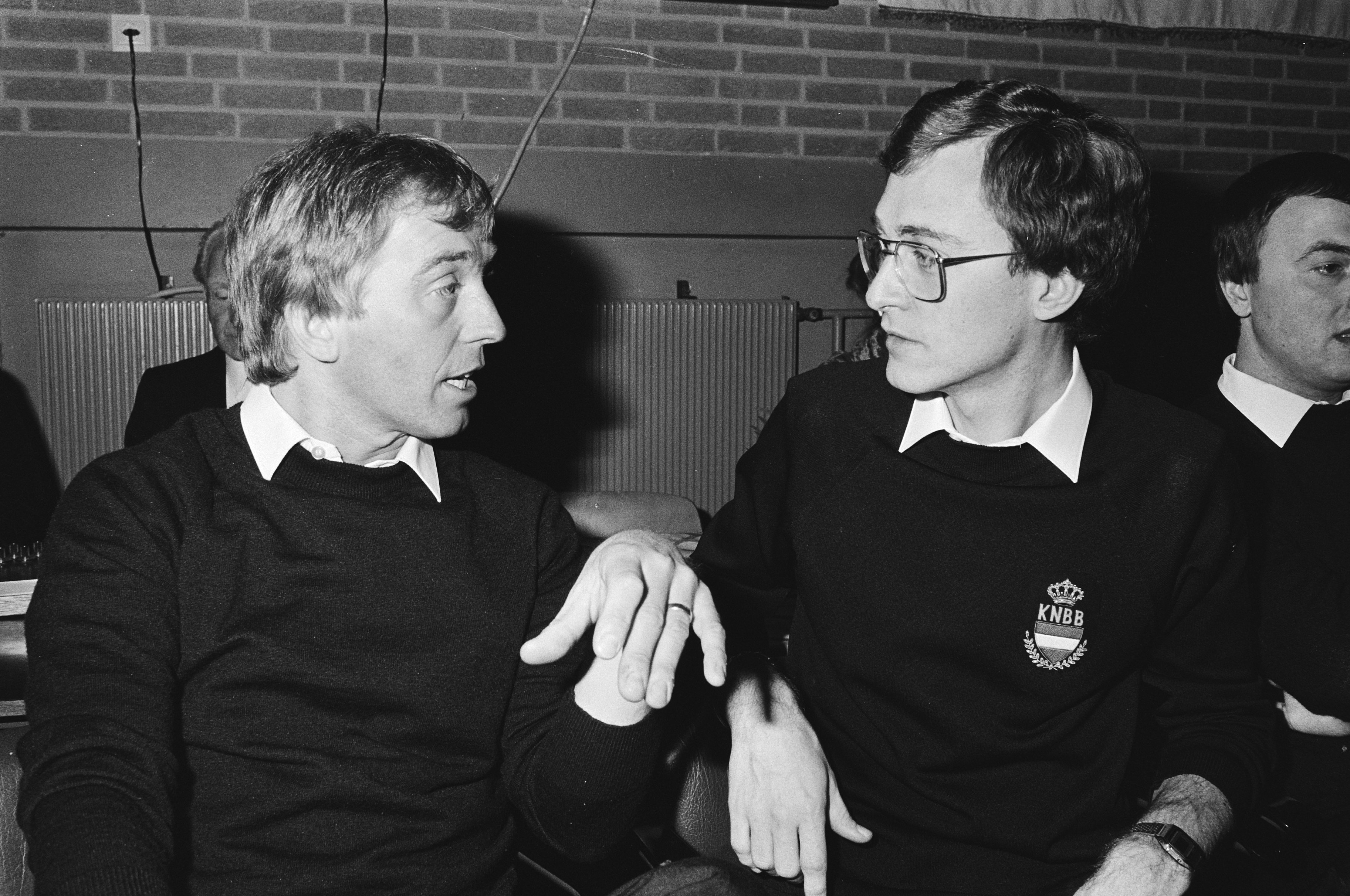 Collectie / Archief : Fotocollectie Anefo Reportage / Serie : NK driebanden, een spelsoort in het carambole biljarten, in Berkhout Beschrijving : Rini van Bracht in gesprek met Van der Smissen Datum : 17 december 1982 Locatie : Berkhout, Noord-Holland Trefwoorden : biljarten Persoonsnaam : Bracht, Rini van, Smissen, Christ van der Fotograaf : Antonisse, Marcel / Anefo Auteursrechthebbende : Nationaal Archief Materiaalsoort : Negatief (zwart/wit) Nummer archiefinventaris : bekijk toegang 2.24.01.05 Bestanddeelnummer : 932-4417